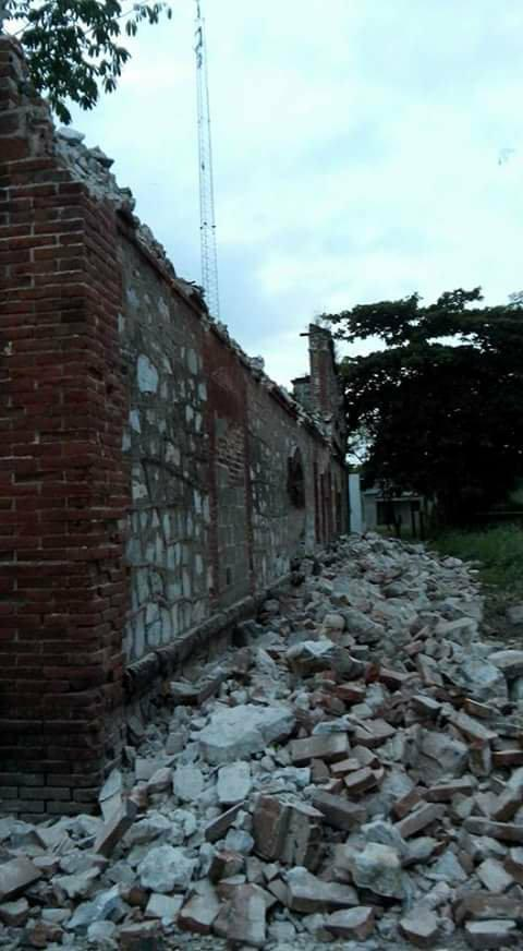 Daños del terremoto en septiembre 3 2018 Municipio de Jesus Carranza Veracruz Mexico